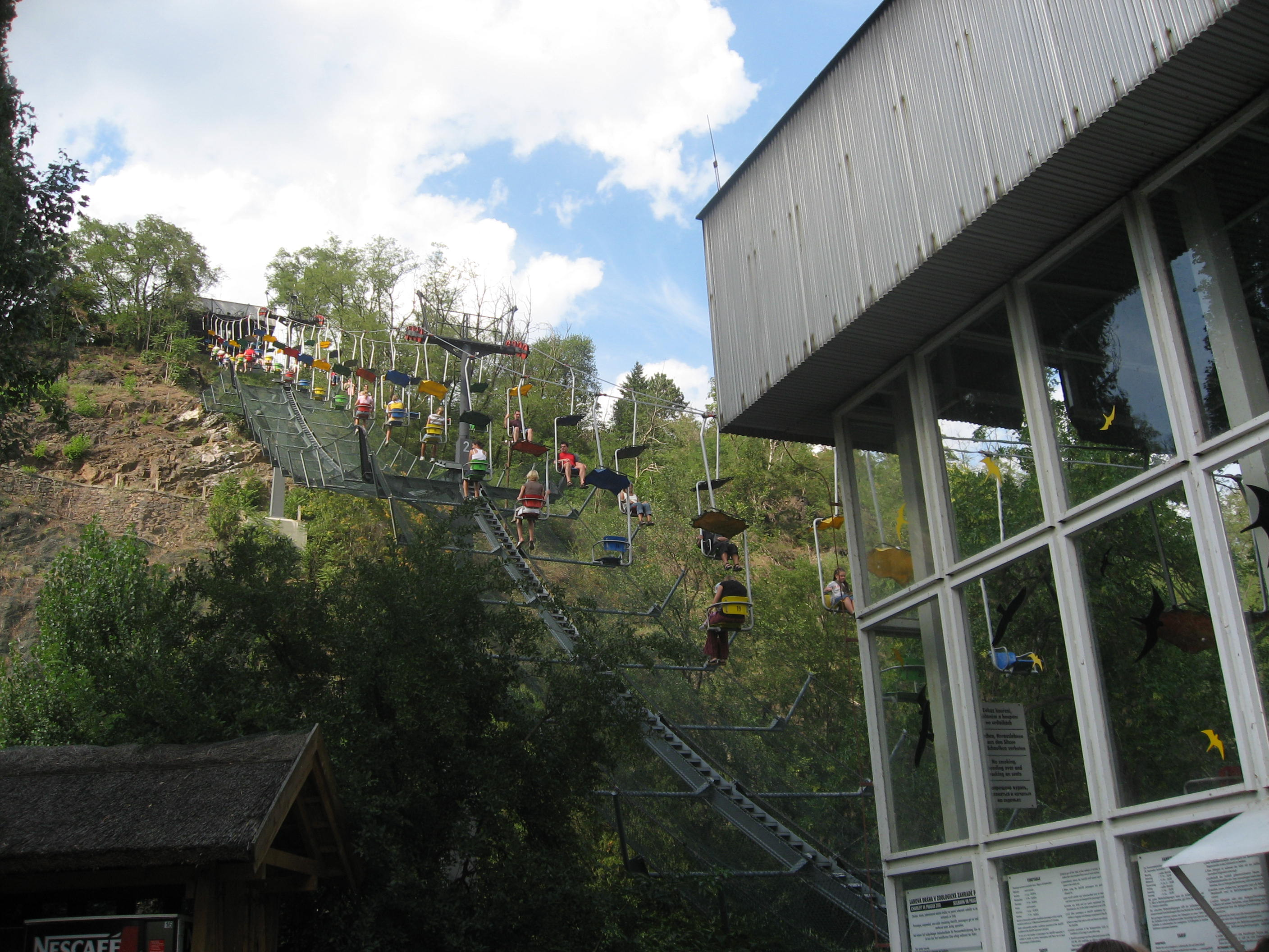 Lanovska v Zoo Praha